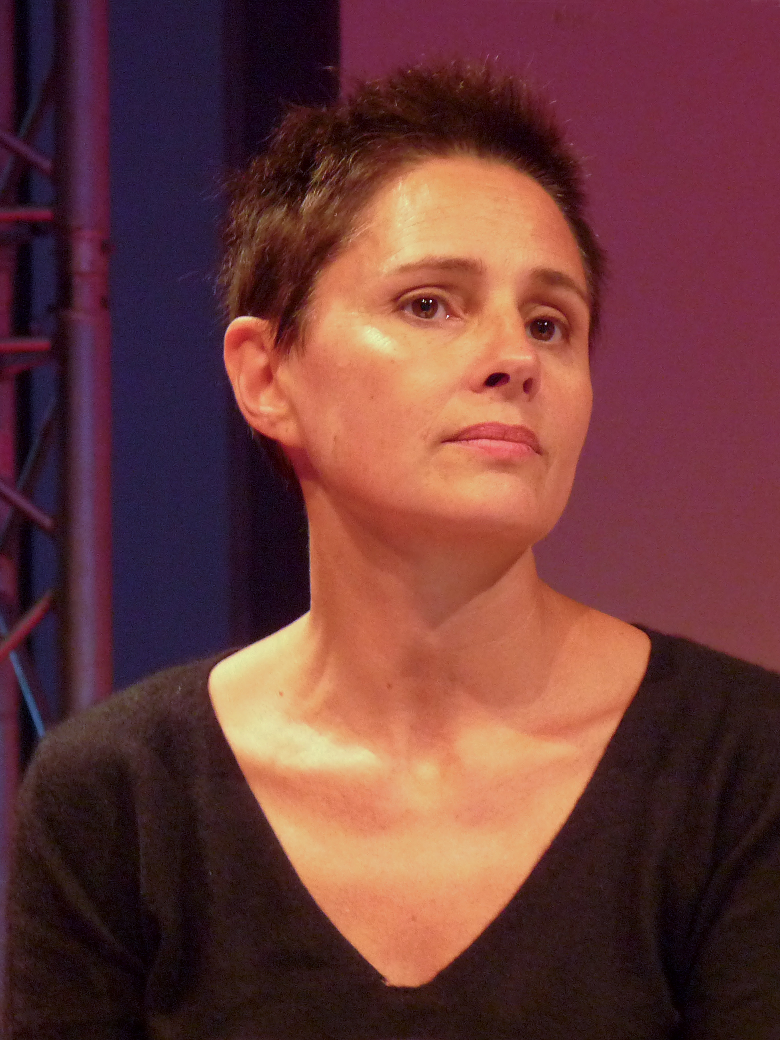 Anouk Grinberg lors d'une lecture autour de l'ouvrage de Tzvetan Todorov, L'Expérience totalitaire. La signature humaine (2011), dans le cadre de la semaine littéraire Bibliothèques idéales (Aubette, Strasbourg)